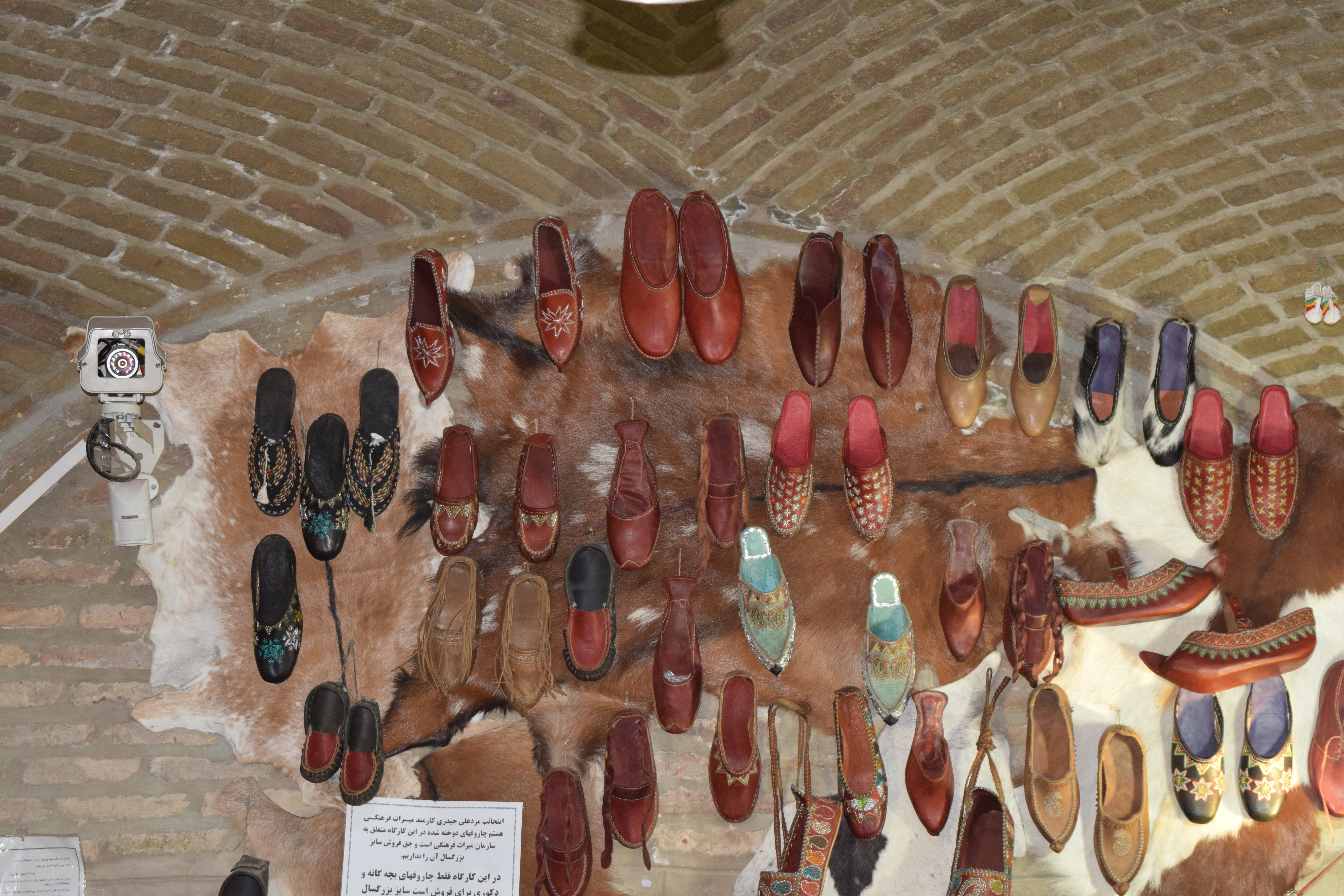 رختشویخانه